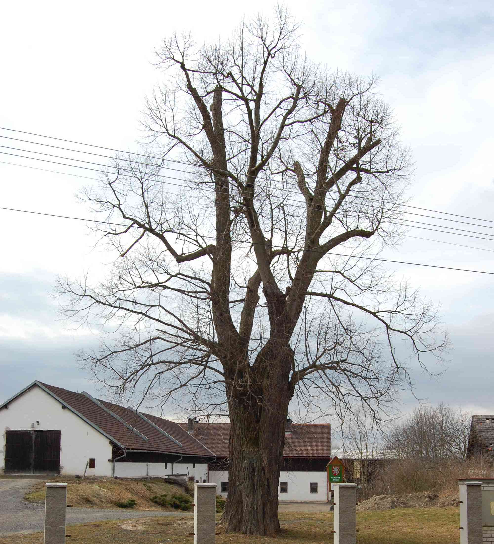 Skašovská lípa v zimě (březen 2010)